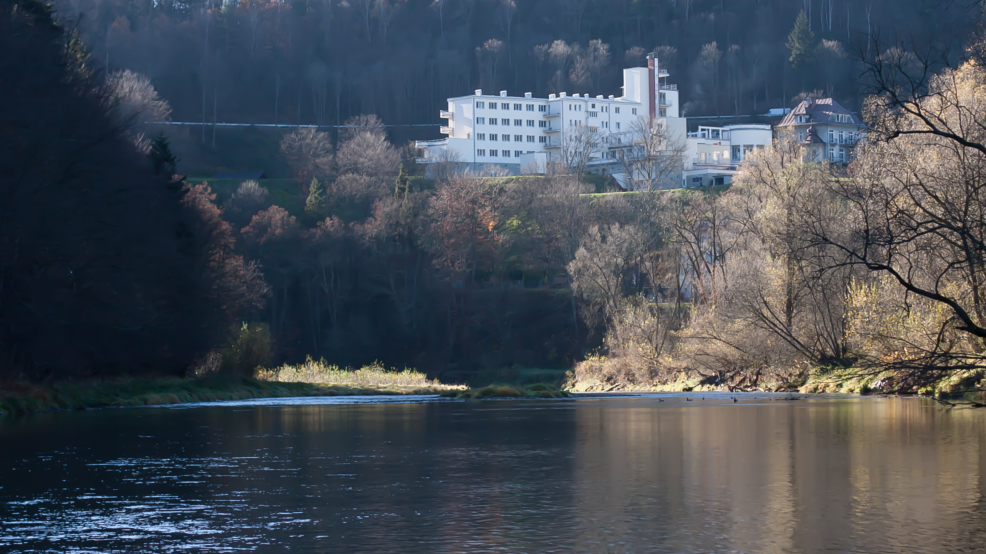 Przełom Popradu, Łopata Polska widok na Sanatorium Wiktor